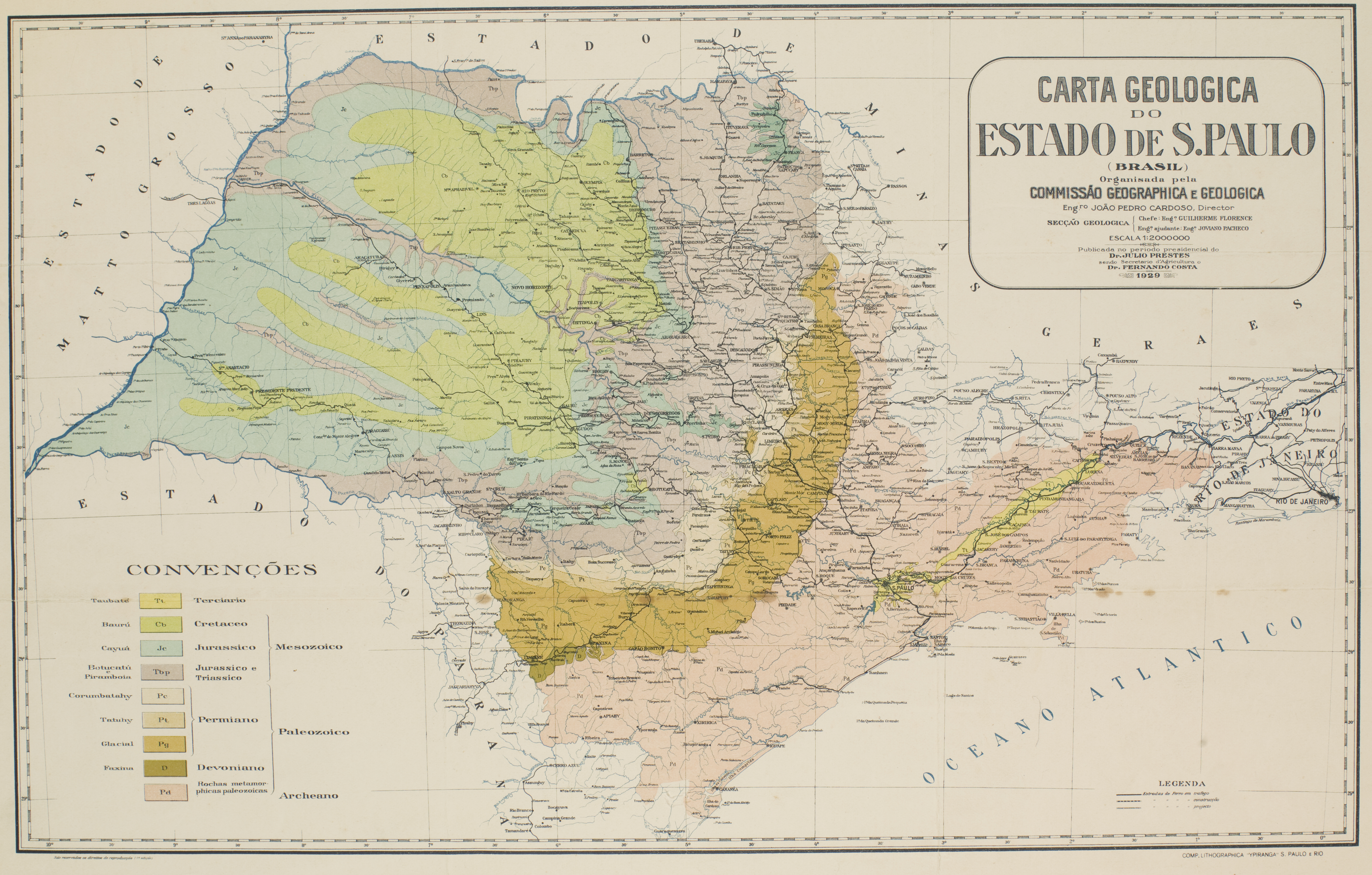 Obra que integra o acervo do Museu Paulista da USP. Coleção João Baptista de Campos Aguirra - Ref. Agente: Comissão Geográfica e Geológica. Companhia Litográfica Ipiranga São Paulo e Rio